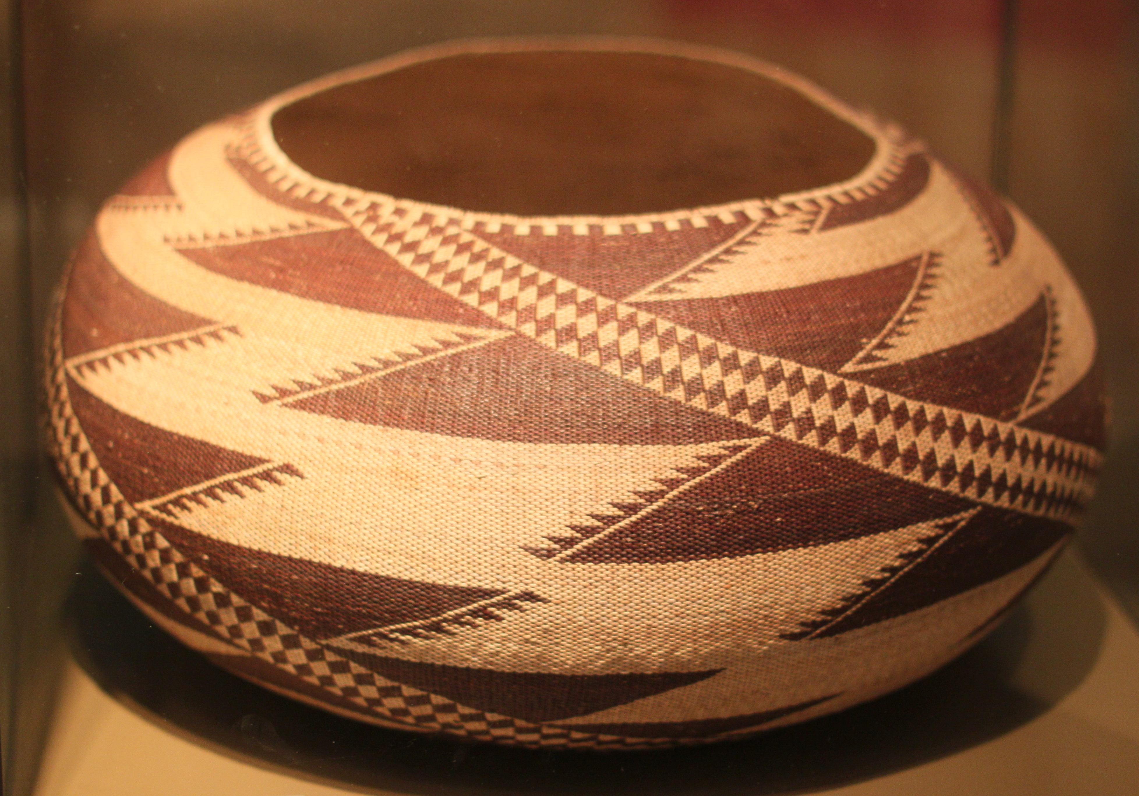 Nordamerikaabteilung im Ethnologischen Museum, Berlin-Dahlem; Zeremonialkorb; Pomo (Ukiah); Sammlung Barrett; 1905